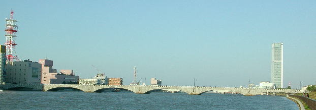 萬代橋（右岸上流側より）